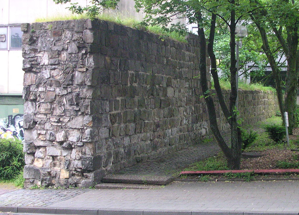 Aachen, Reste der ersten (inneren) Stadtmauer am Templergraben, Ecke Elfschornsteinstrasse